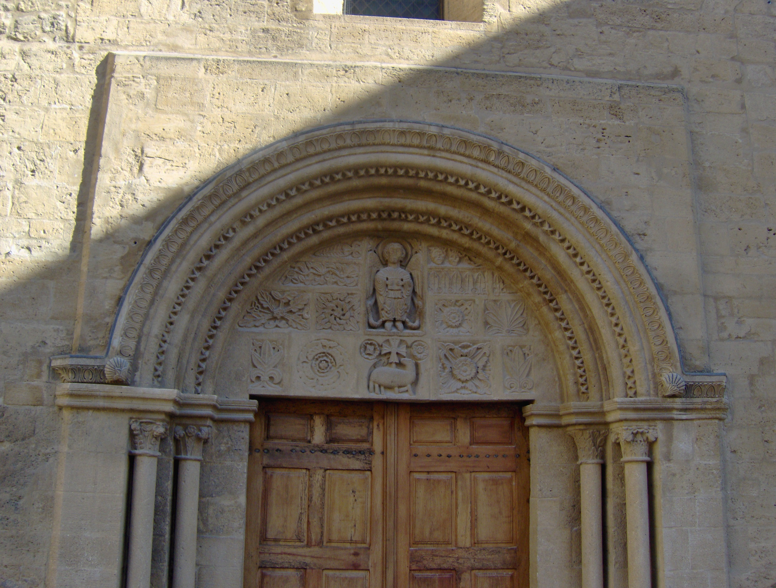 Kirche Saint-Michel in Salon-de-Provence, Westportal mit skulptiertem Tympanon